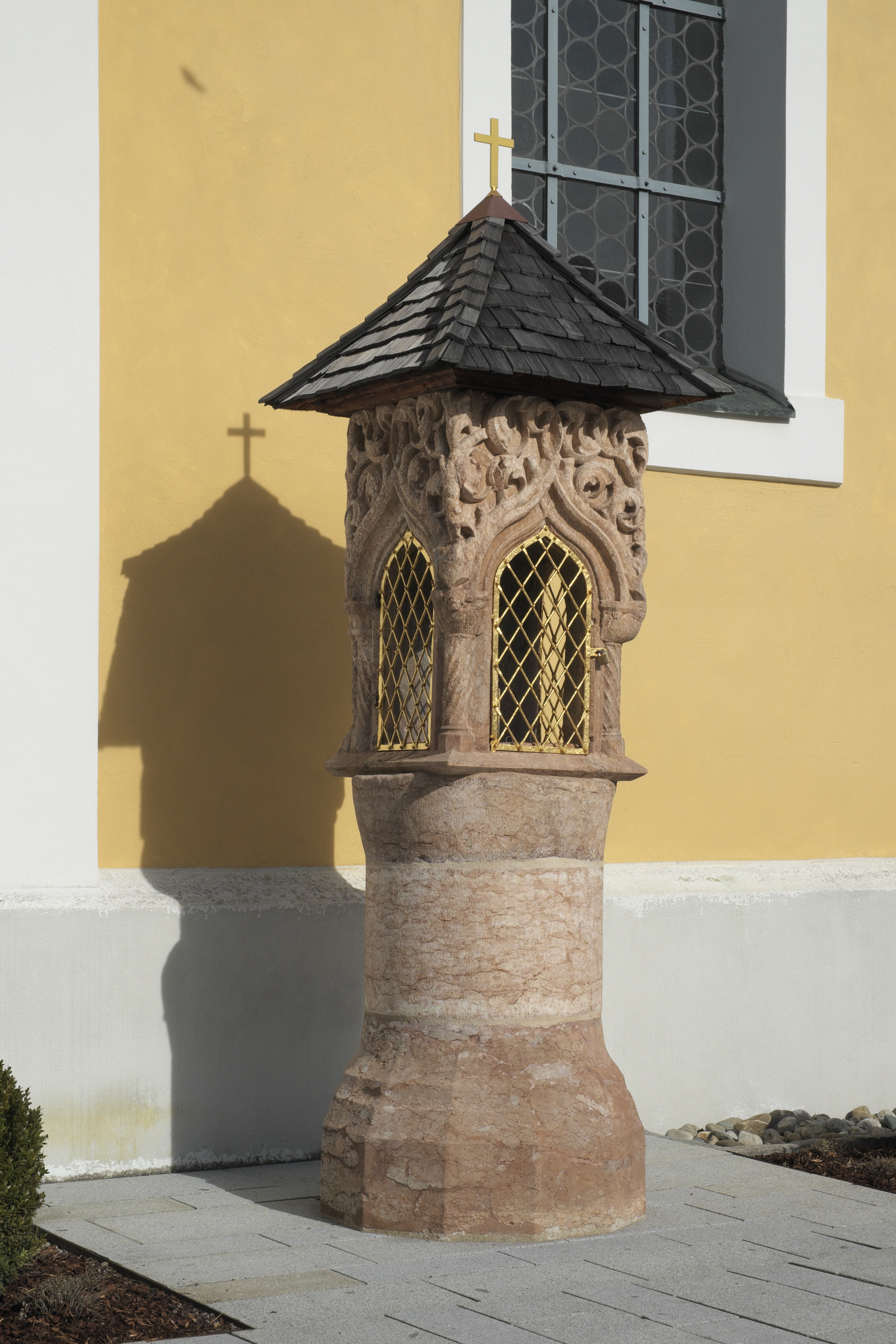 Katholische Pfarrkirche St. Martin in Waging am See im Landkreis Traunstein (Bayern/Deutschland), spätgotisches Sakramentshaus, von 1510